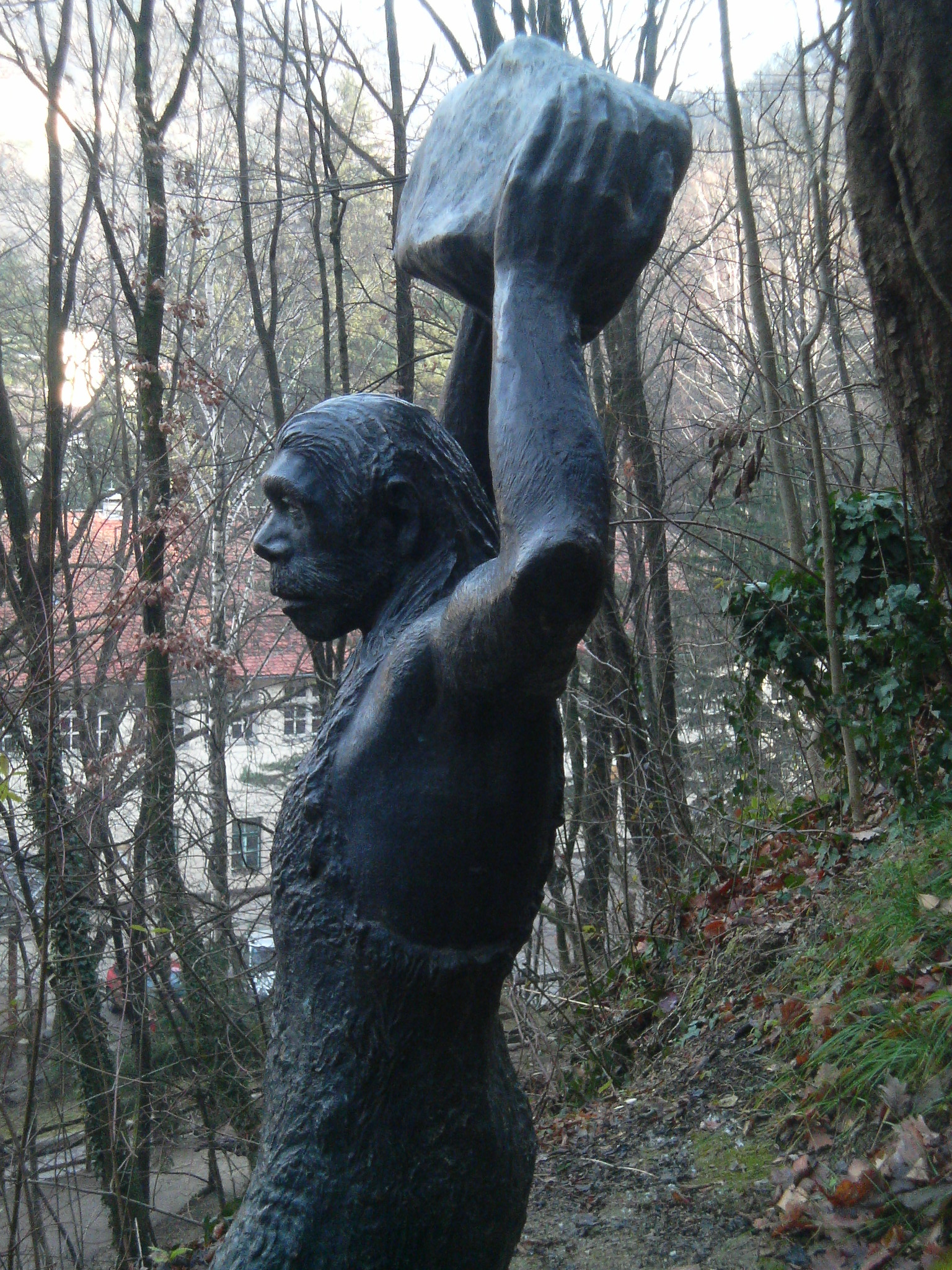 Nalazište pračovjeka Krapina